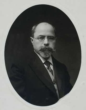 Фотопортрет П. Я. Стебницького з дарчим написом Миколі Васильовичу. 5 червня 1915 р., м. Санкт-Петербург.